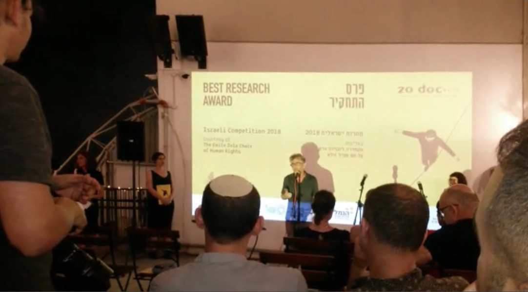 Preisverleihung beim Docaviv Festival 2018